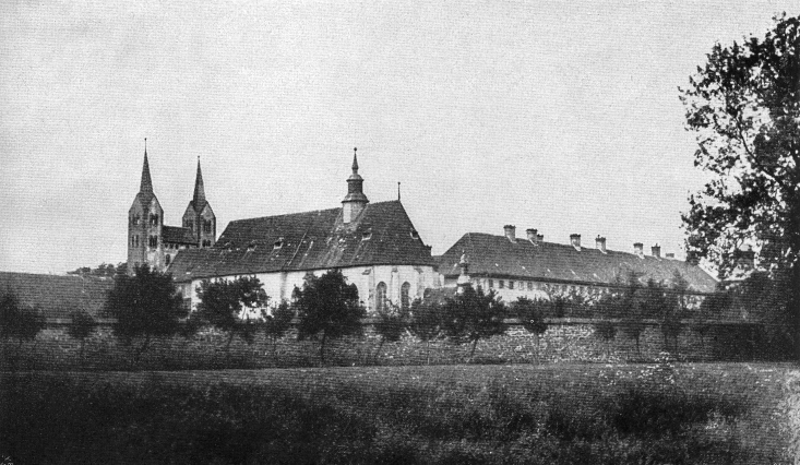 Originalbeschreibung „Corvey“. – Nordrhein-Westfalen, Deutschland.